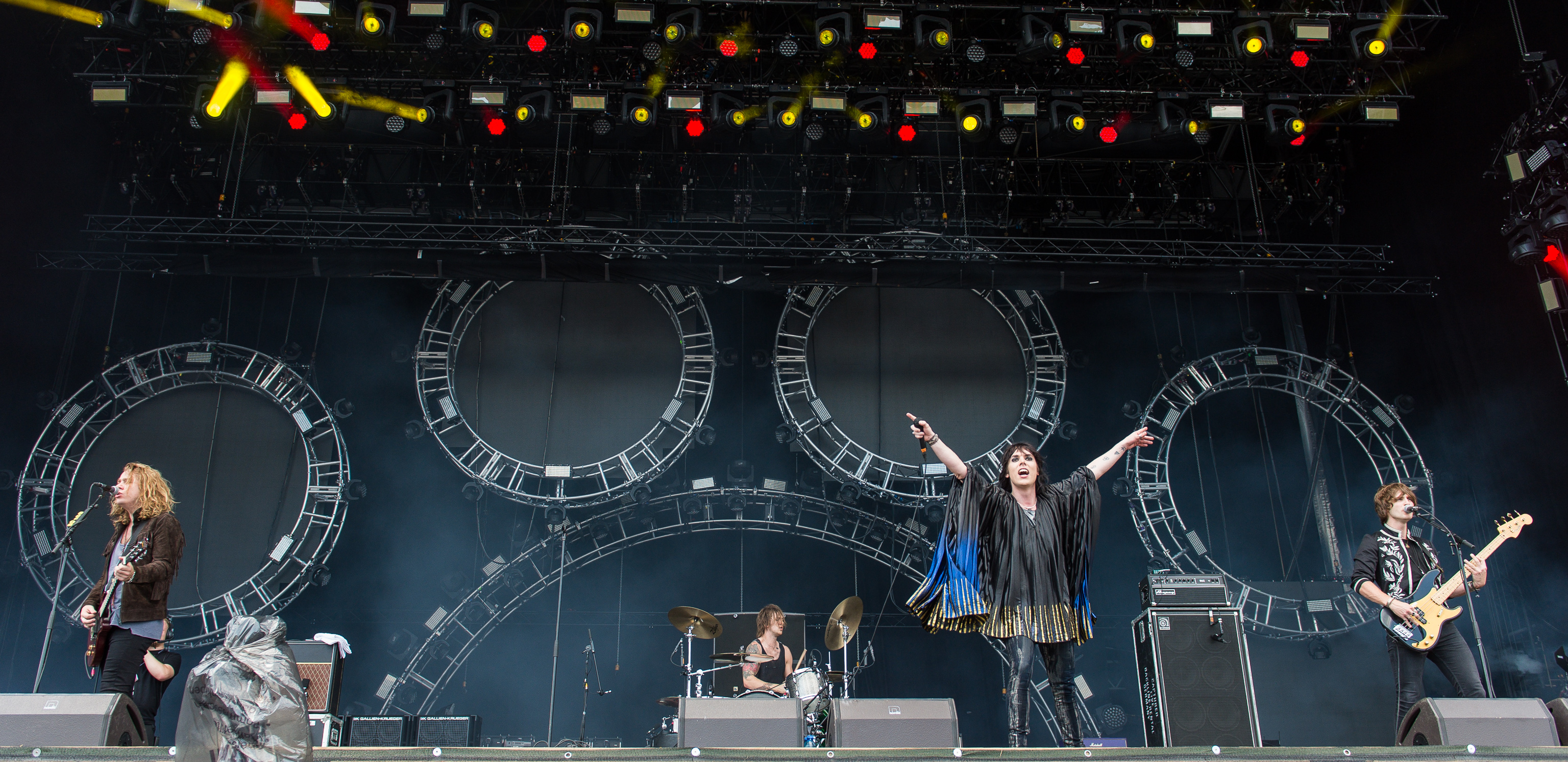 ARGO-Konzerte,Adam Slack,Festival,Genthin Davies,Jed Elliott,Konzert,Livekonzert,Livemusik,Luke Spiller,Musik,RiP,Rock im Park 2016,Seat Zeppelin Stage,The Struts